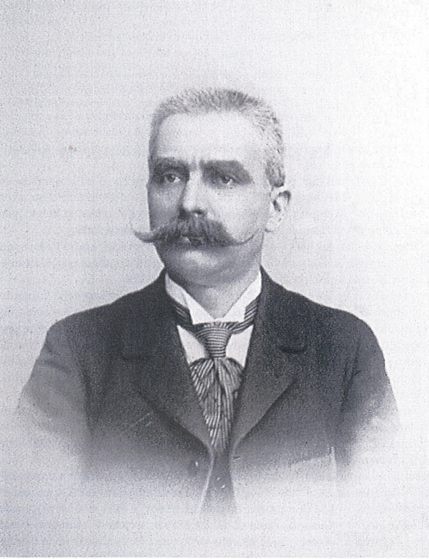 Silvio De Pretto